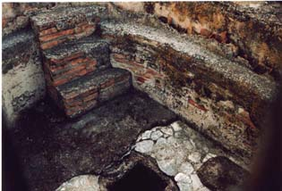 ReggioCalabria-RomanBaths